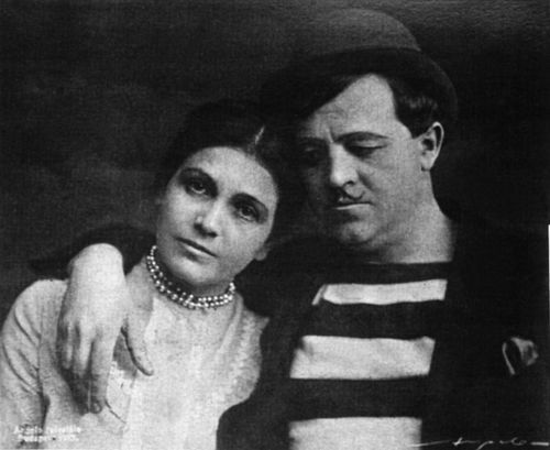 Molnár Ferenc: Liliom - Varsányi Irén és Csortos Gyula